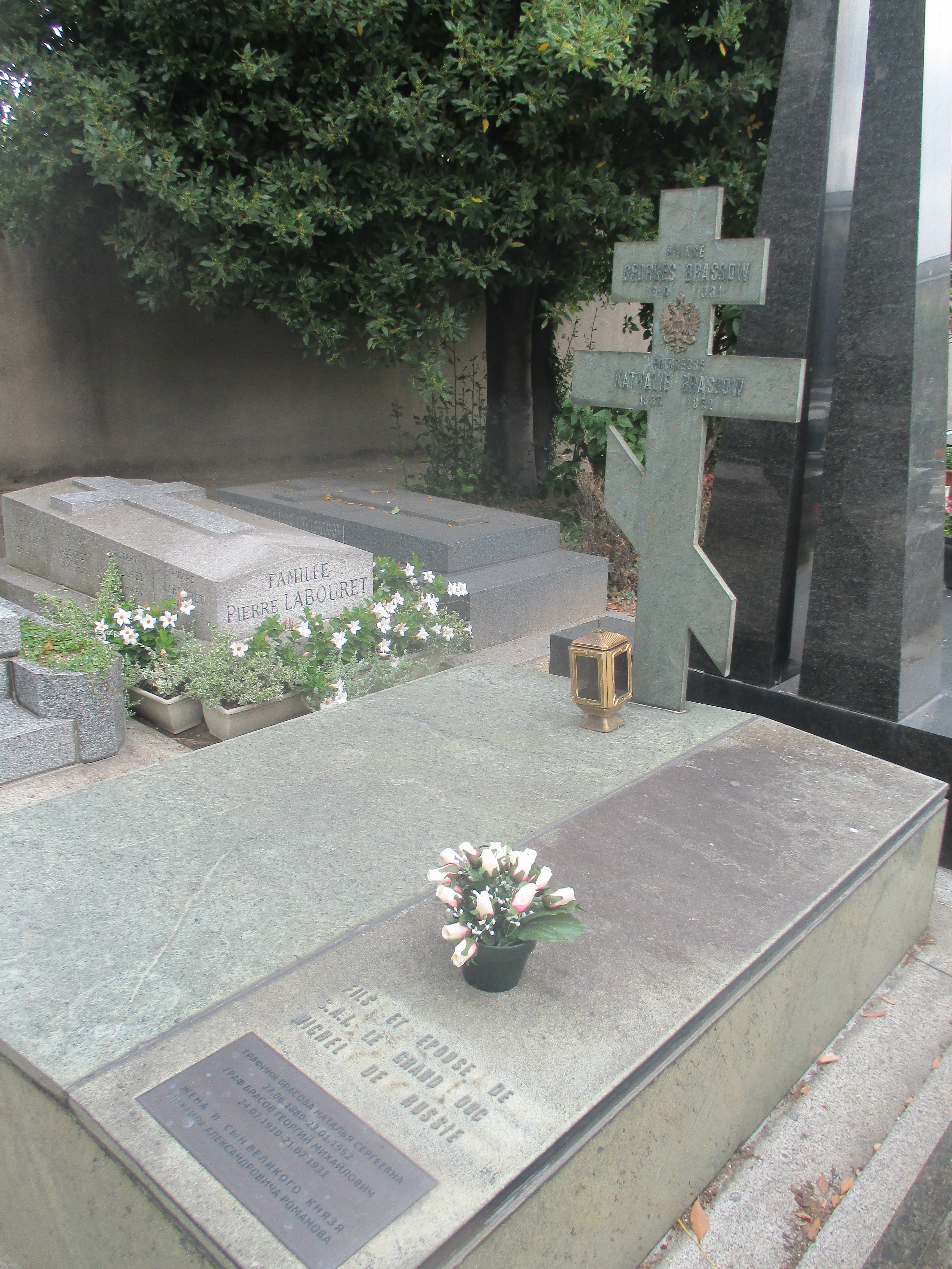 Tombe du prince Brassow et de sa mère.